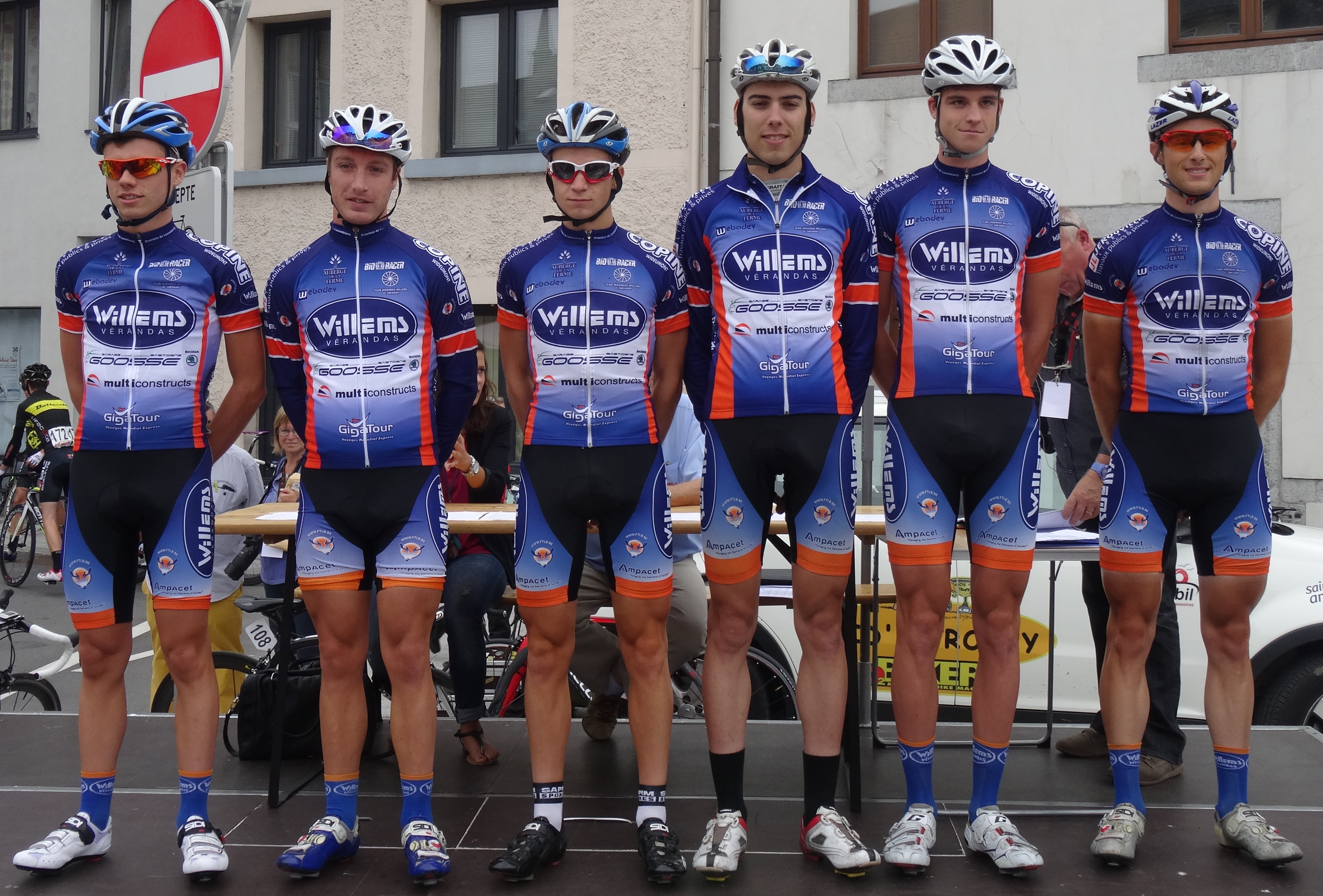 Reportage photographique réalisé le mercredi 6 août à l'occasion du départ de la première étape du Tour de la province de Namur 2014 à Jambes (Namur), Belgique.